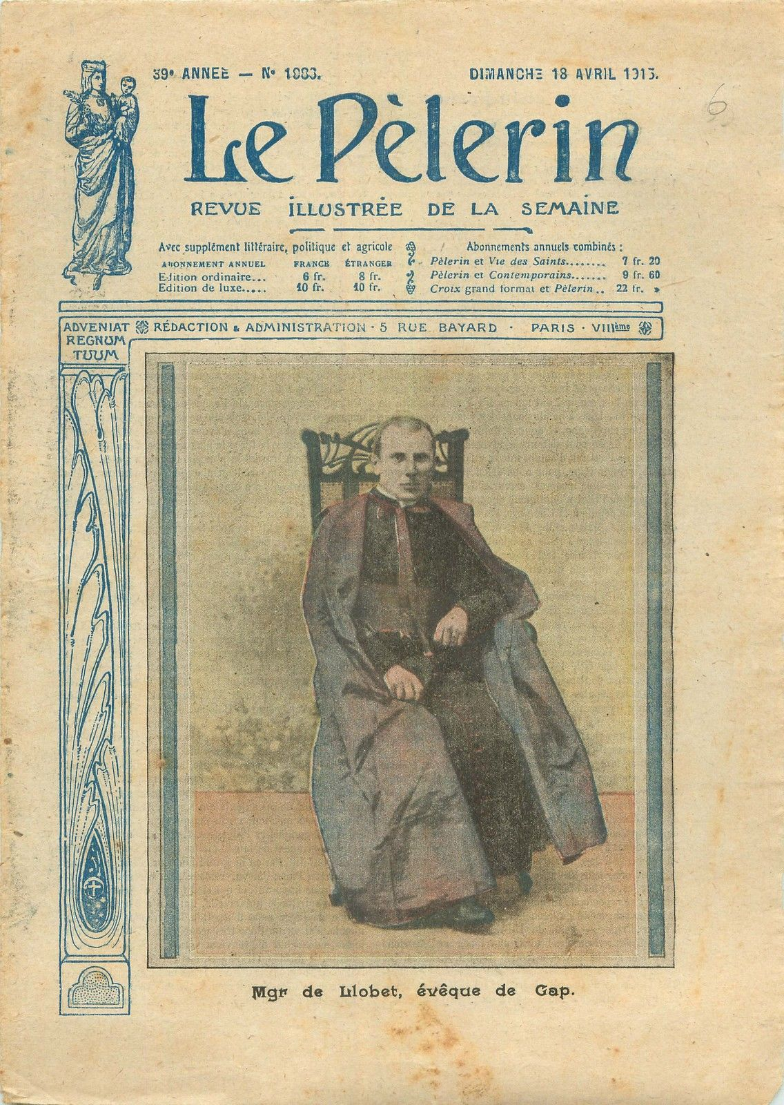 Couverture du Pèlerin du 18 avril 1915 avec Mgr Gabriel de Llobet (1872-1957).